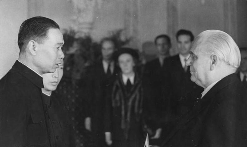 Wilhelm Pieck mit chinesischem Botschafter Tschi Peng Fei Illus/Heilig 12.10.1950 Präsident Pieck empfing chinesischen Botschafter. Am 12.10.1950 empfing Präsident Pieck den Außenordentlichen und Bevollmächtigten Botschafter der chinesischen Volksrepublik General Tschi Peng Fei zur Übernahme seines Beglaubigungsschreibens. UBz: Während der Übergabe des Beglaubigungsschreibens. (Rechts) Präsident Pieck, (links) Chef der chinesischen diplomatischen Mission Tschi Peng Fei. Abgebildete Personen: Pieck, Wilhelm: Präsident, Politbüro der SED, Vorsitzender der KPD, DDR Tschi Peng-fei: Botschafter in der DDR, Außenminister, China